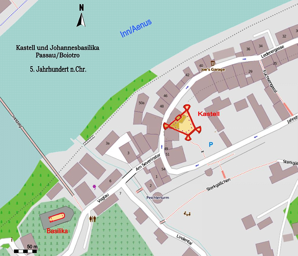 Lageskizze des spätantiken Kastells und der Johannesbasilika im 5. Jahrhundert n.Chr. in Passau/Boiotro (D).